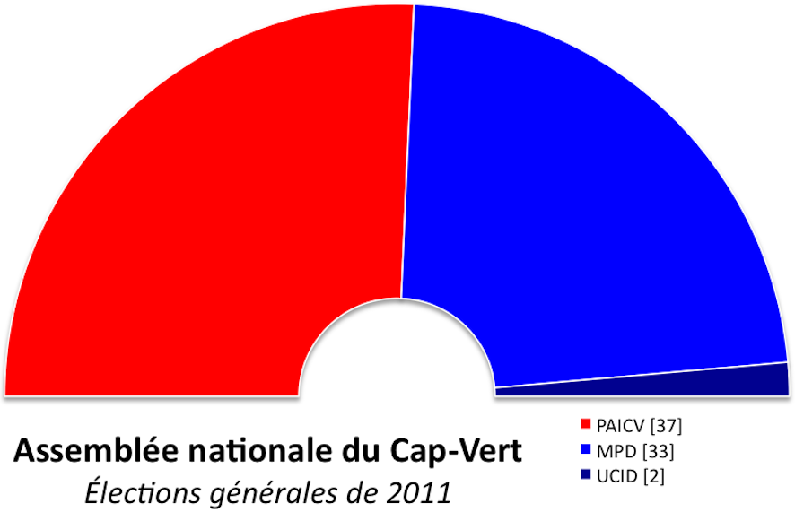 Composition politique de l'Assemblée nationale du Cap-Vert après les élections législatives du 6 février 2011.